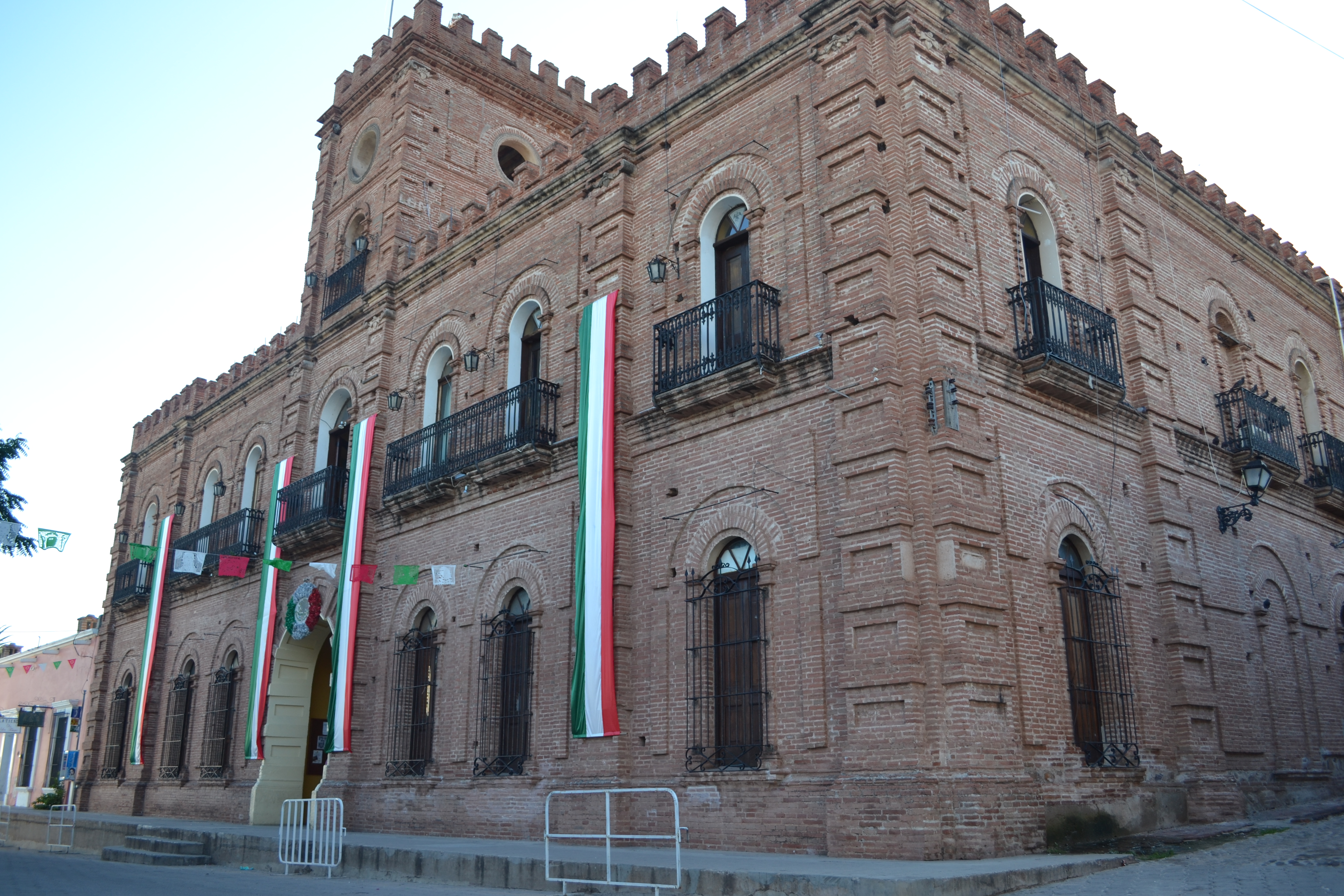 Palacio Municipal